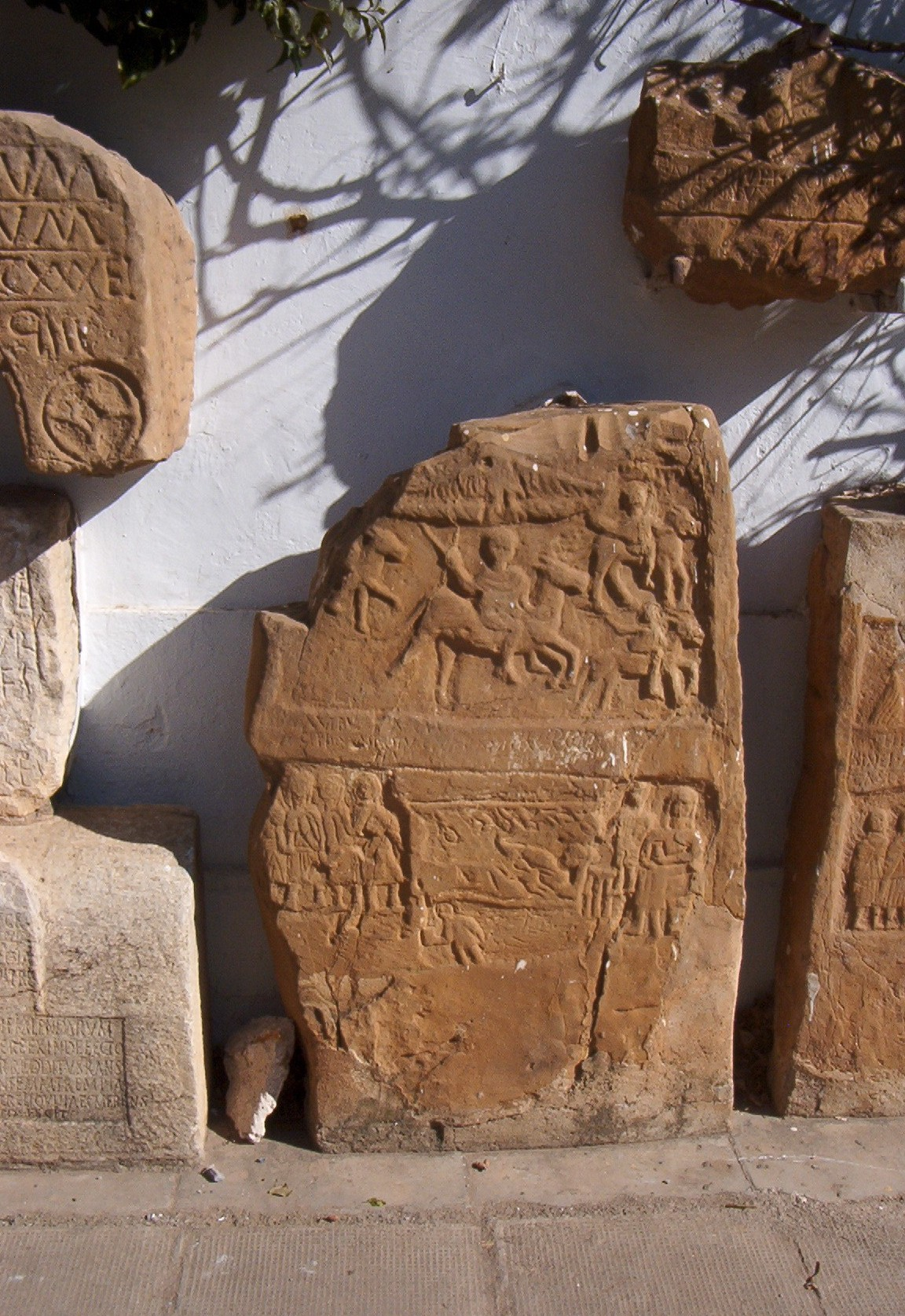 Stèles lybico-puniques du musée des antiquités à Alger